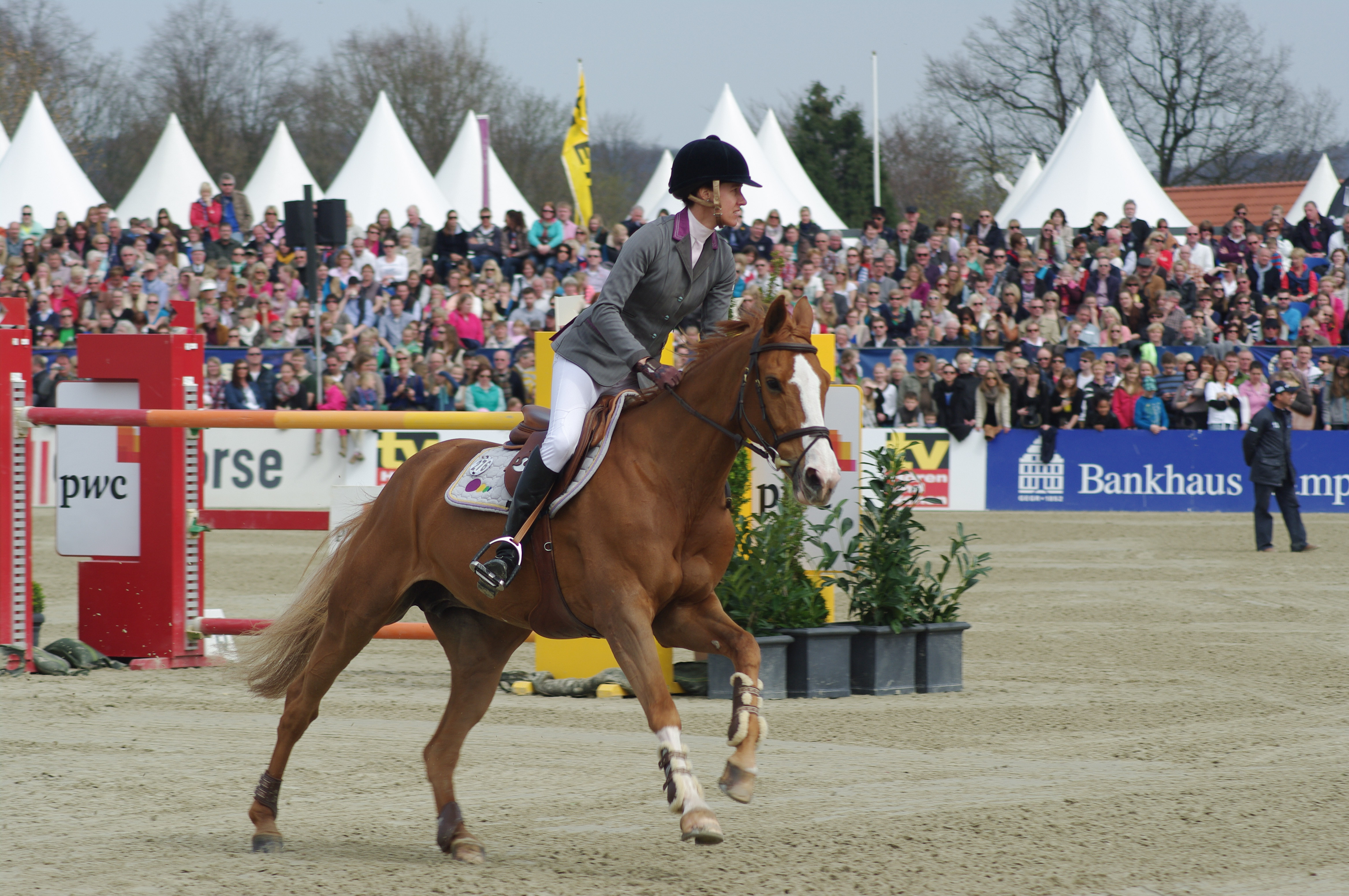 Horses & Dreams 2013: Luciana Diniz mit "Fit for Fun 13